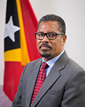 Adriano do Nascimento, Abgeordneter des Nationalparlaments Osttimors